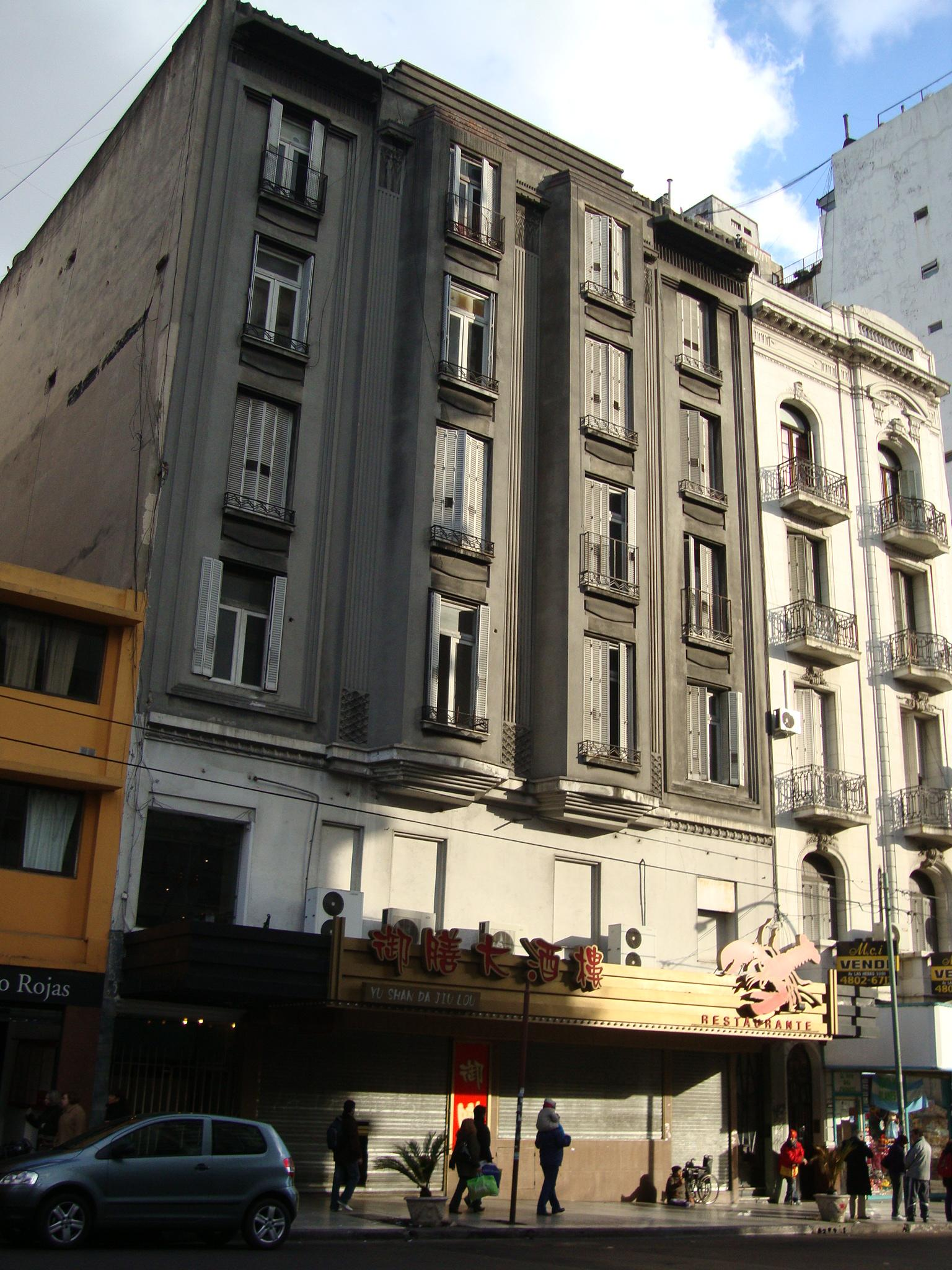 Edificio del Cine Cosmos, cerrado en 2008. Su sala original fue transformada en un local gastronómico, también desocupado actualmente. Fue comprado a fines de 2009 por la Universidad de Buenos Aires, que anunció que reabrirá el cine como centro cultural.